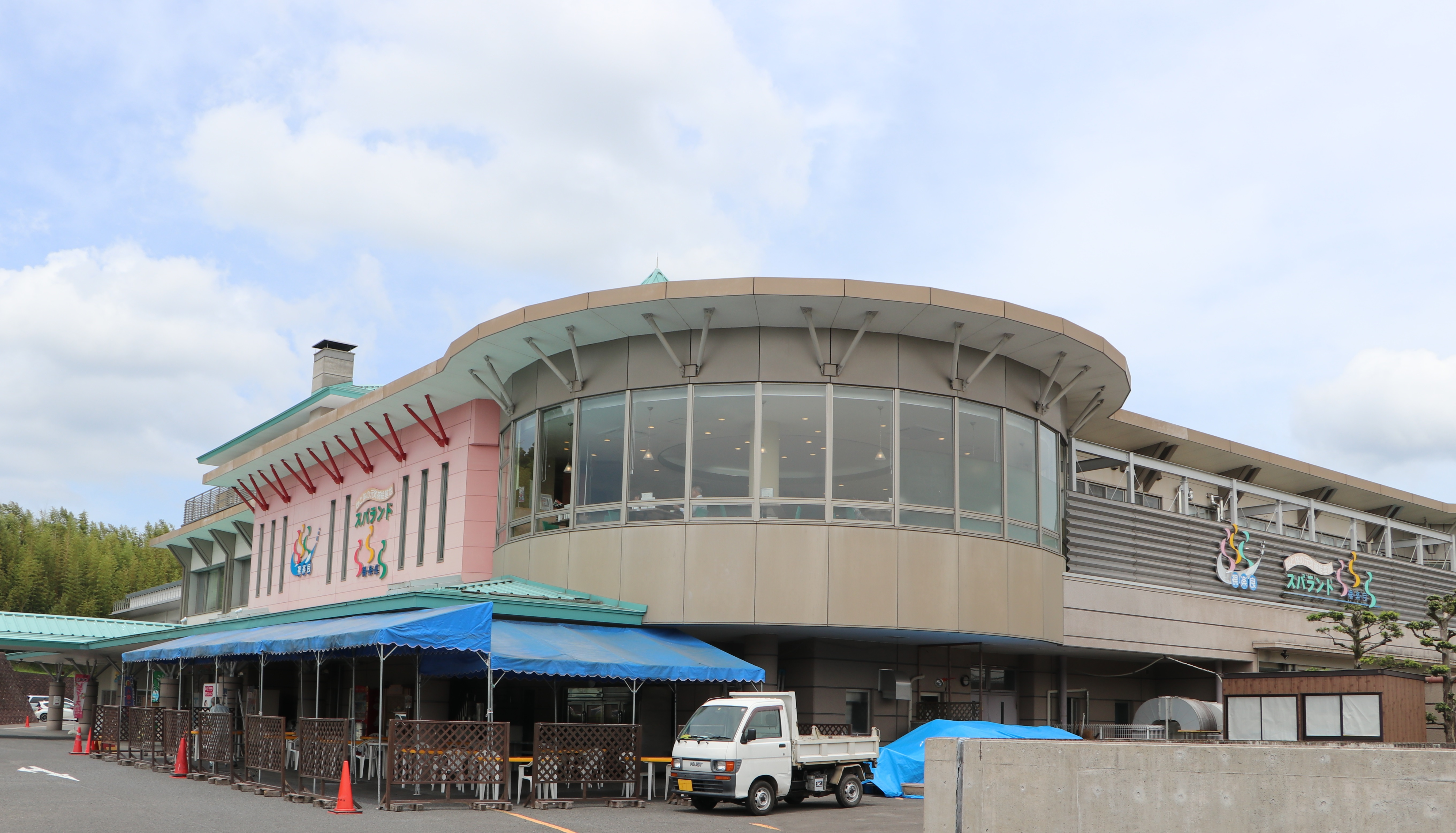 スパランド裸・楽・良の外観